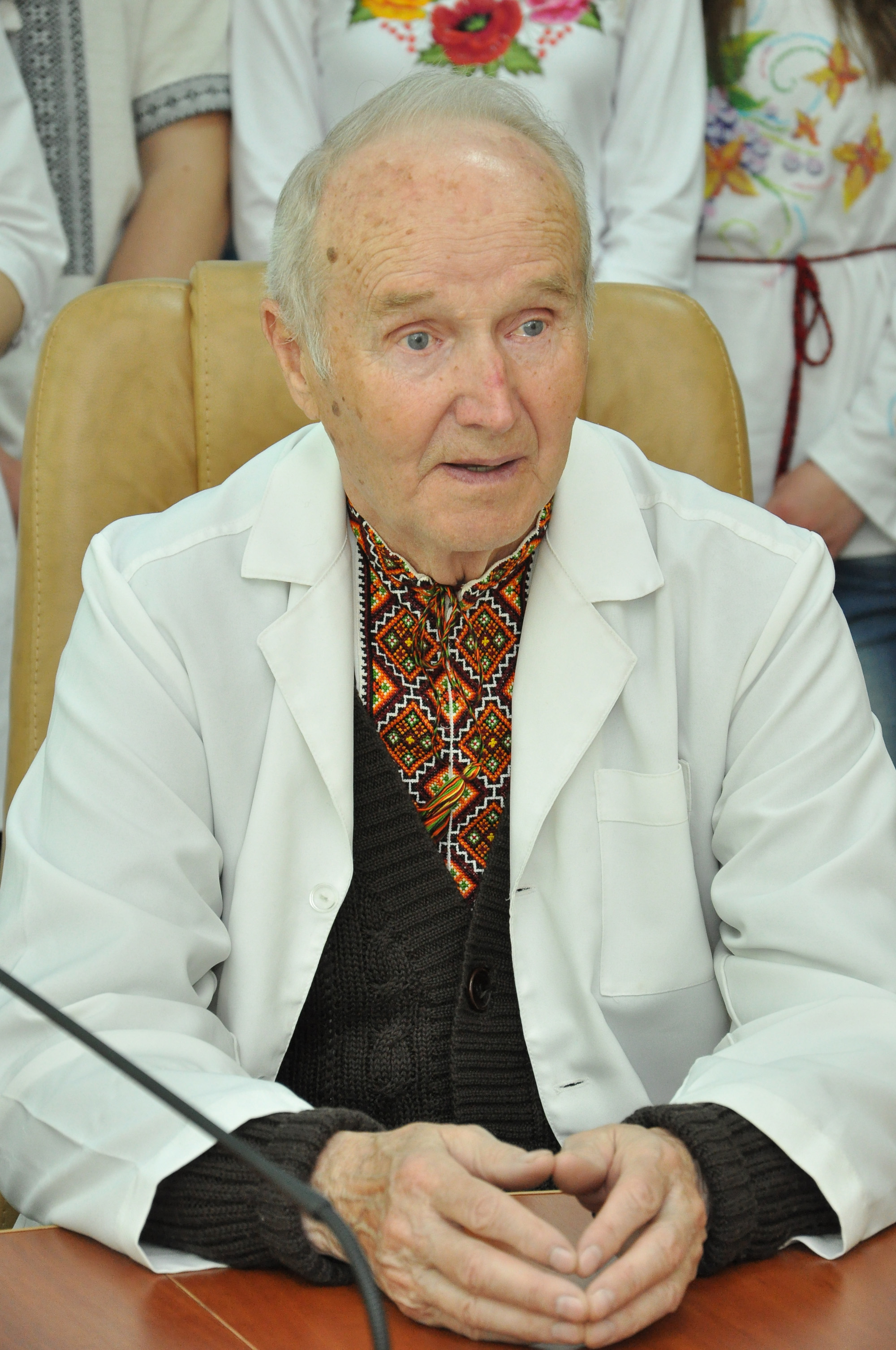 Професор Ярослав Гонський Горбачевських читань на кафедрі біохімії Тернопільського державного медичного університету імені І. Я. Горбачевського.